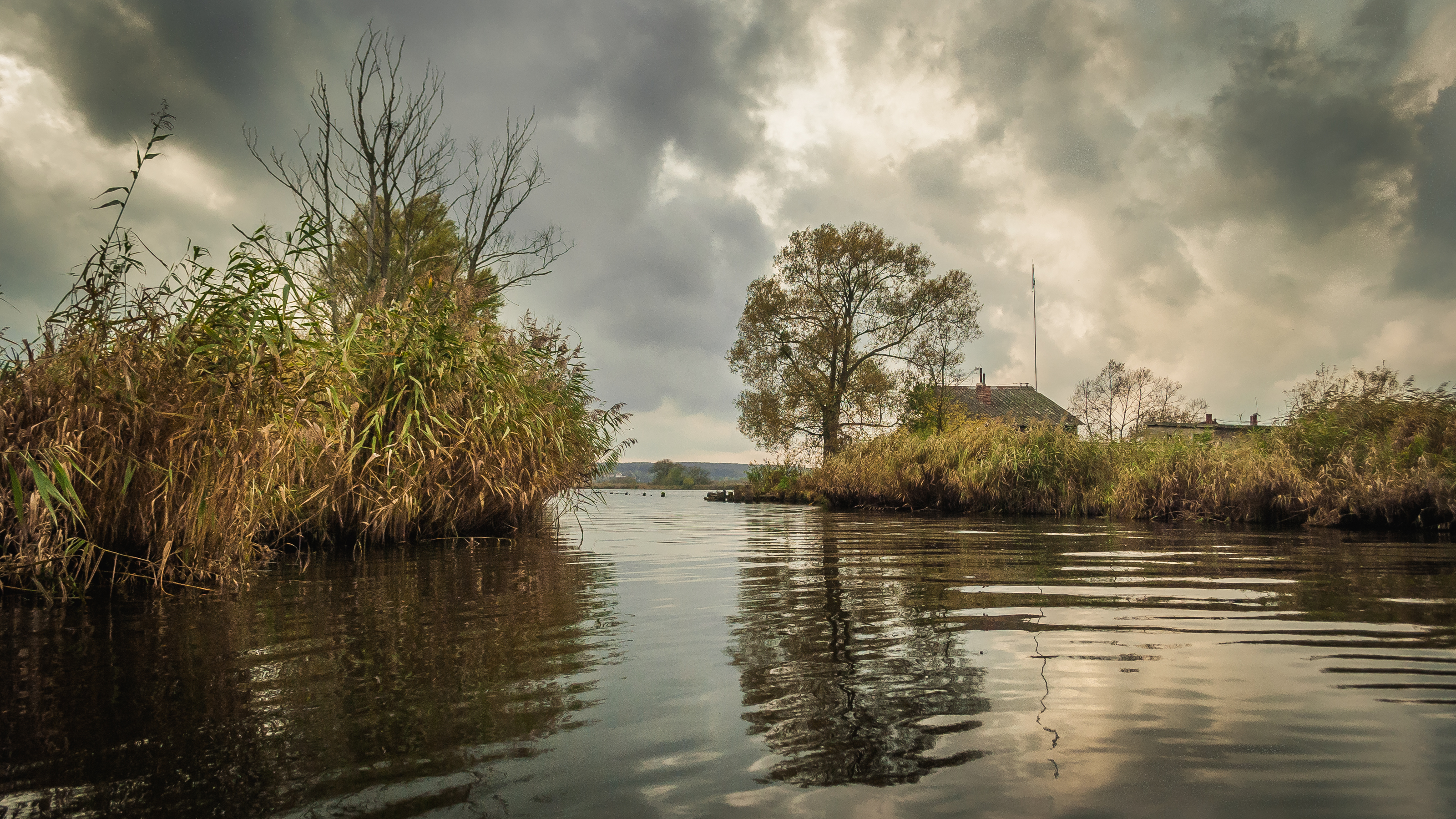 Specjalny obszar ochrony siedlisk Ujście Odry i Zalew Szczeciński. This is a photography of Natura 2000 protected area with ID PLH320018